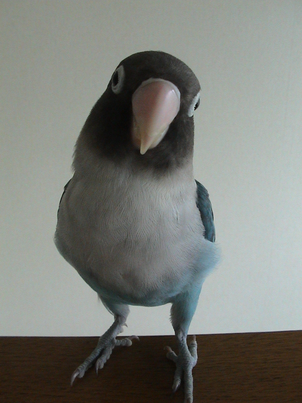 飼い鳥